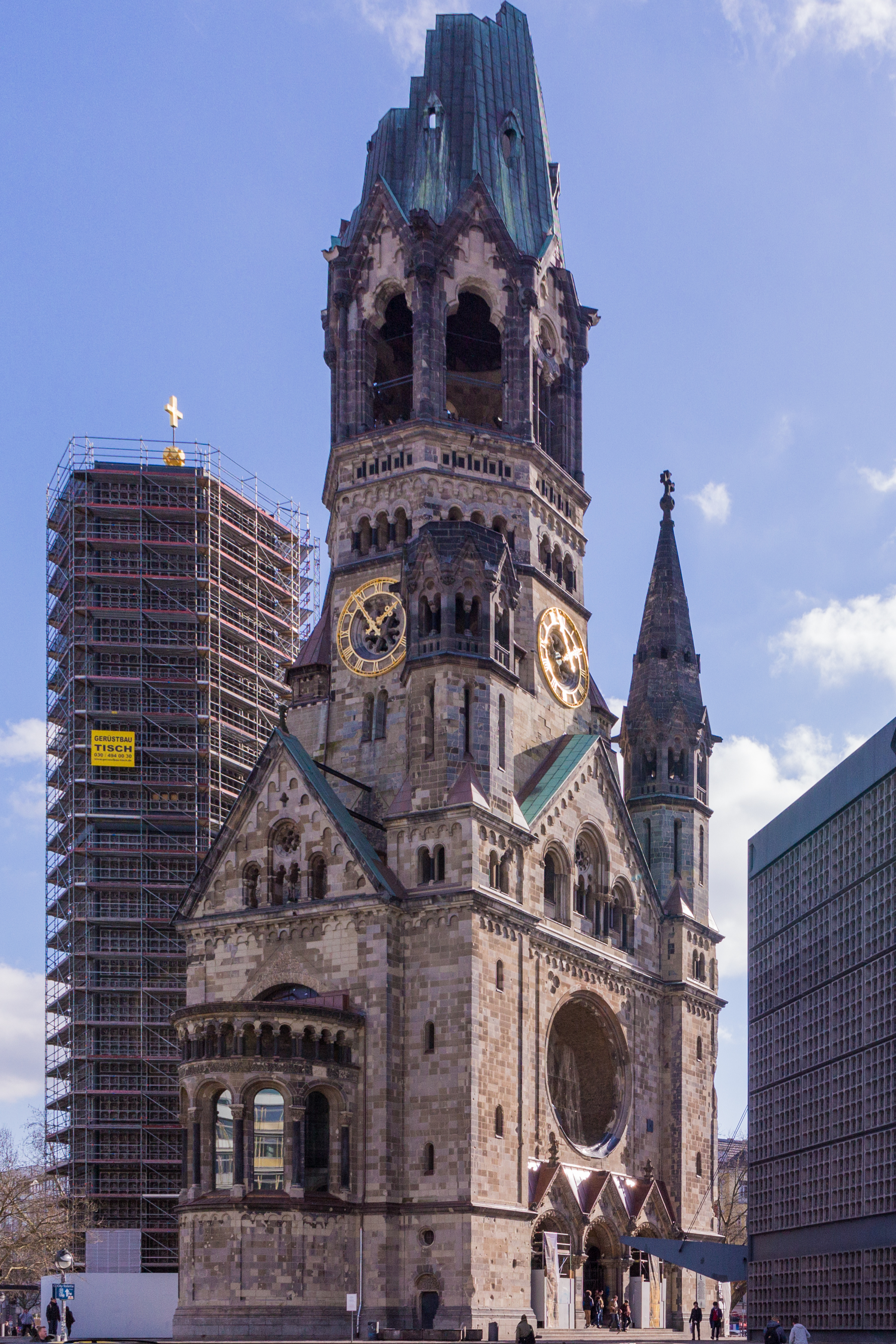 Gedächtniskirche Berlin 2015